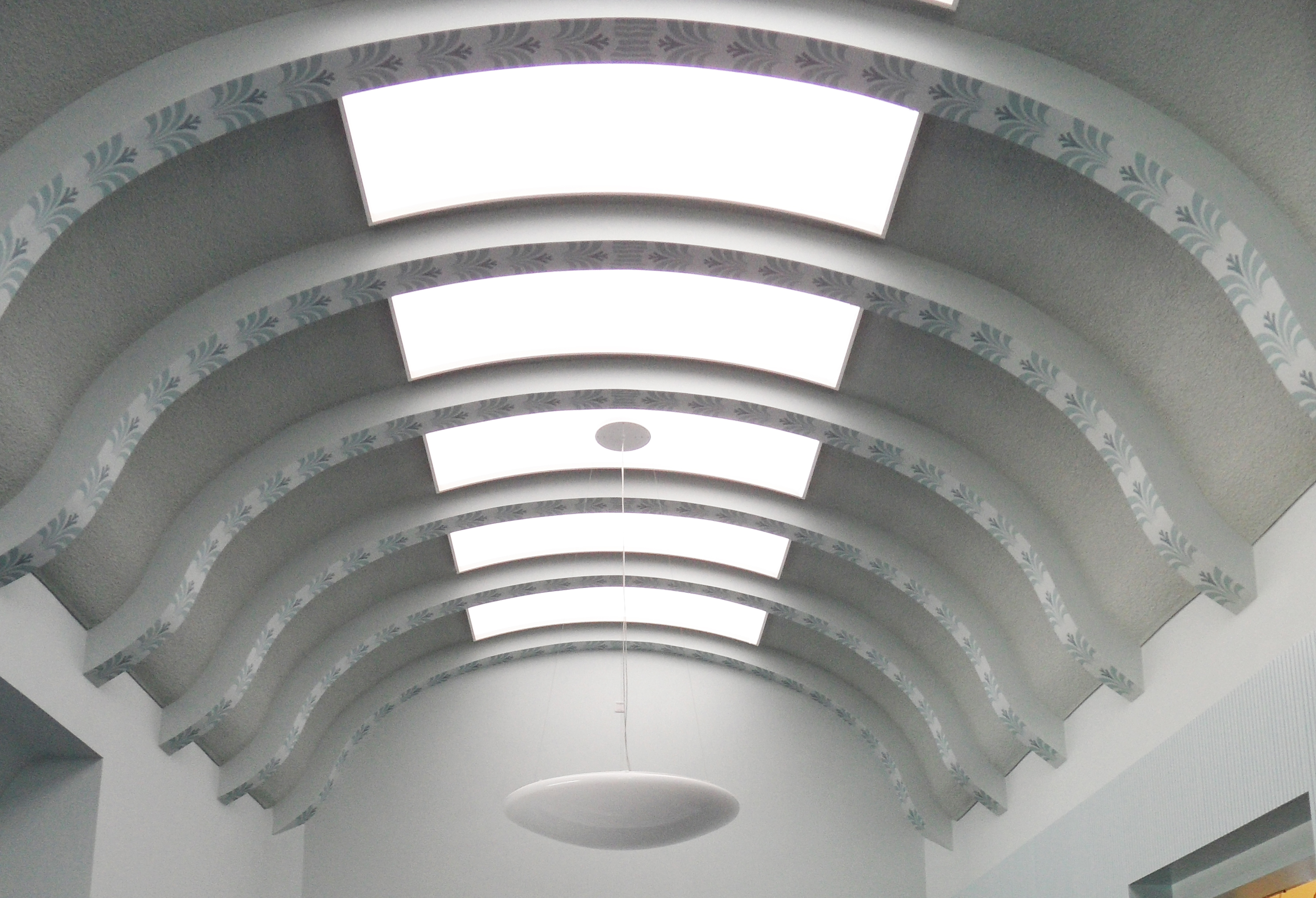 Die Verstärkung eines Tonnendaches in Zwickau aus dem Jahr 1903 kann in diesem Zusammenhang ebenfalls aufgeführt werden. Bei beiden nur 8 cm dicken Stahlbetonkonstruktionen wurde die vorhandene Tragfähigkeit mit ca. 1-2 cm dicken Carbonbetonschichten auf das heute geforderte Niveau erhöht. Vor allem durch den sehr dünnen Schichtenauftrag kann man dem Wunsch des Denkmalschutzes – das ursprüngliche Erscheinungsbild zu erhalten – gerecht werden.